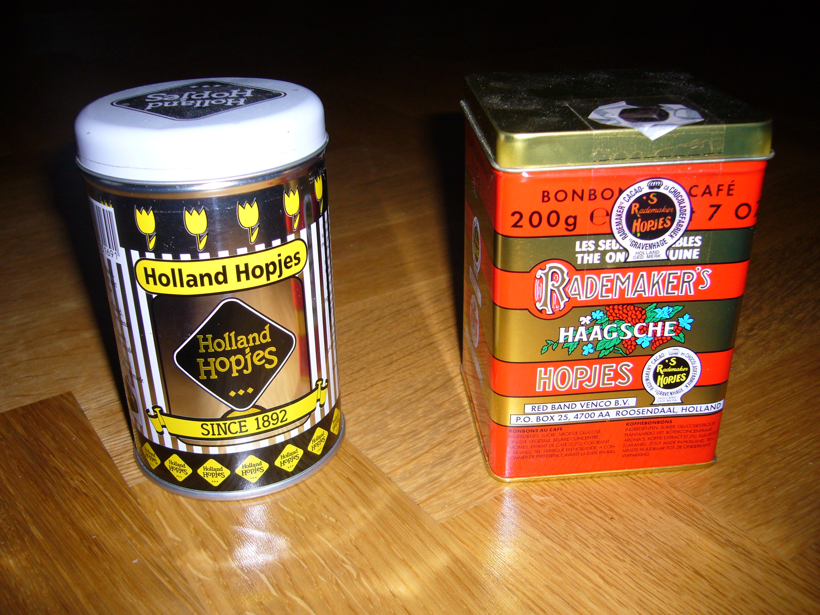 Hopjes